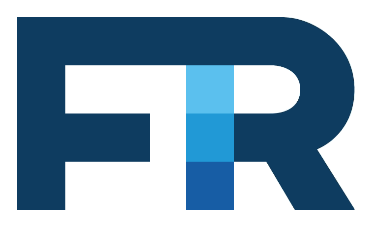 Logo del Frente Renovador desde 2018